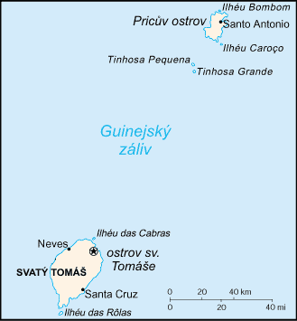 Mapa pro Svatý Tomáš a Princův ostrov - přeložená mapa z CIA World Factbook.